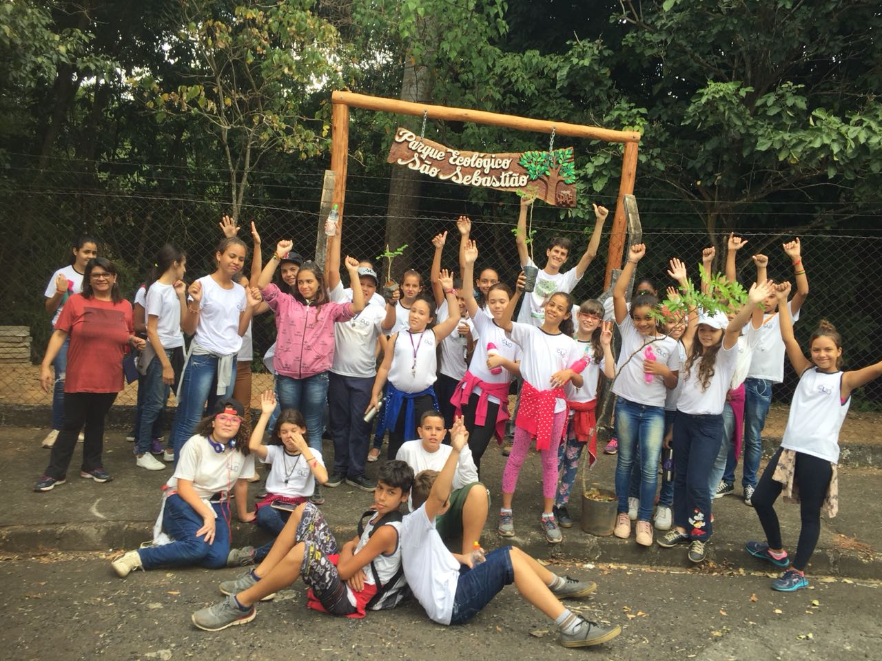 Escola Dr.Carlos Lima Dias realiza visita no parque.